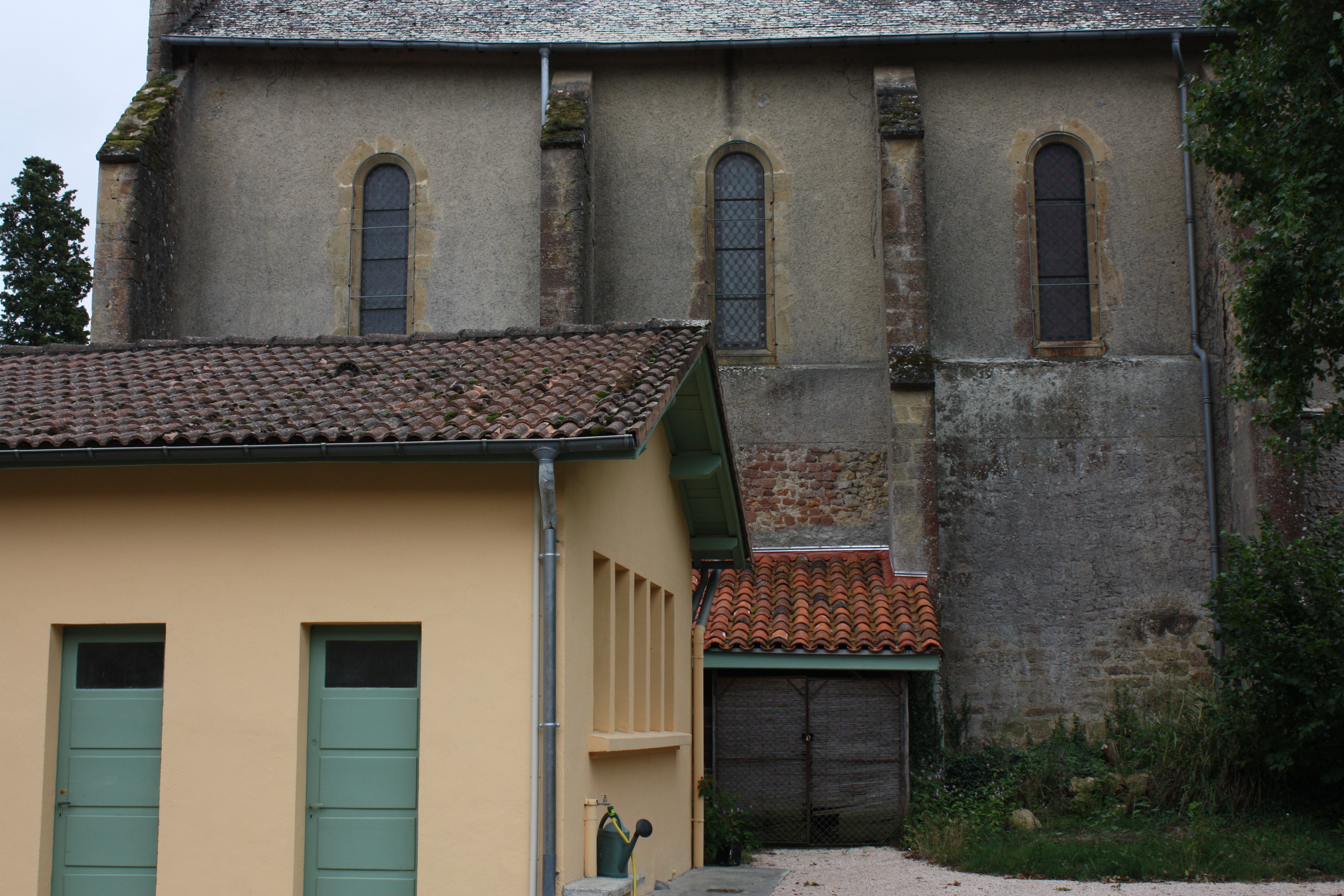 Saint-Justin - Eglise Saint-Justin